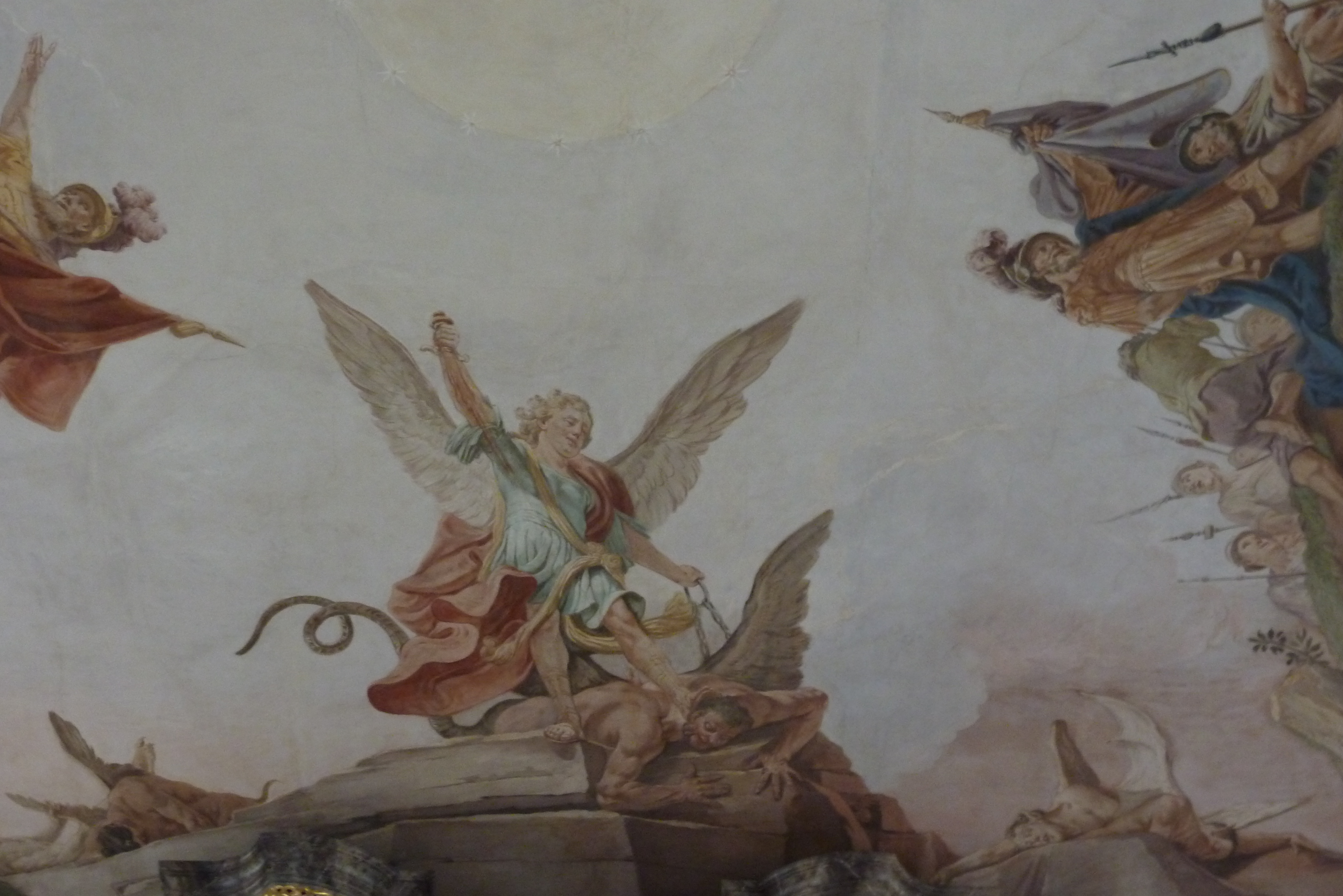 Katholische Pfarrkirche Mariä Reinigung in Steinheim an der Donau, Deckenfresko von 1776 von Matthäus Günther, Darstellung des Erzengels Michael im Kampf gegen Luzifer